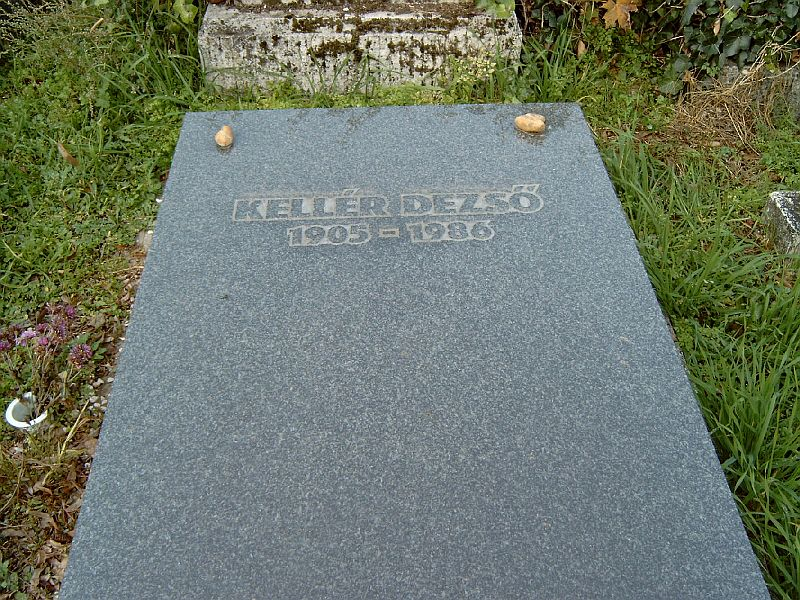 Kellér Dezső (Budapest, 1905. december 1. – Budapest, 1986. szeptember 24.) Író, humorista, dramaturg, konferanszié sírja Budapesten. Kozma utcai zsidó temető: 5B-8.